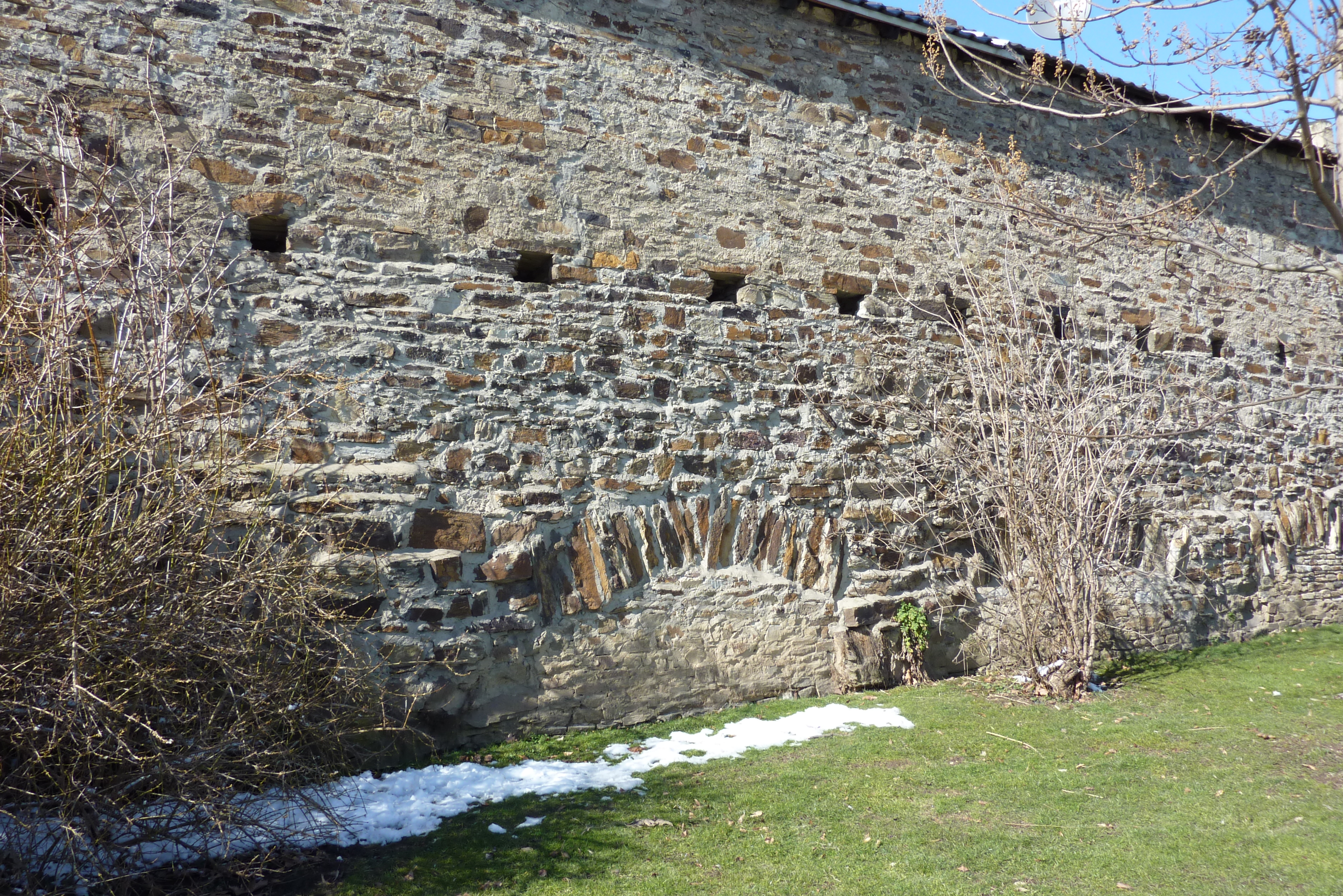 Stadtbefestigung (Ahrweiler), Stadtmauer zwischen Kanonenturm und Niedertor